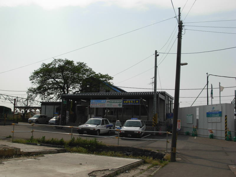 JR矢代田駅仮駅舎